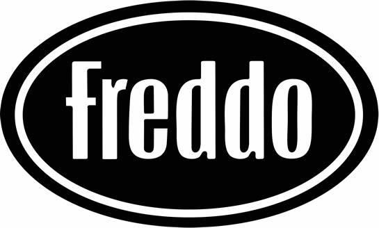 logo de Freddo